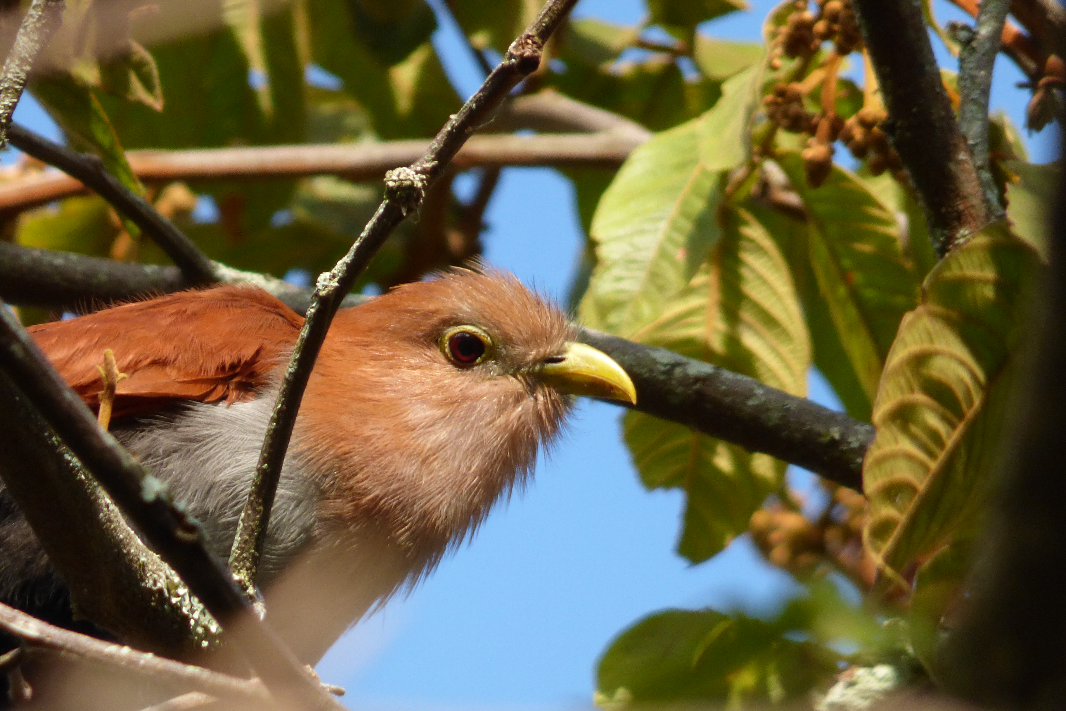 Piaya cayana (Cuco ardilla)